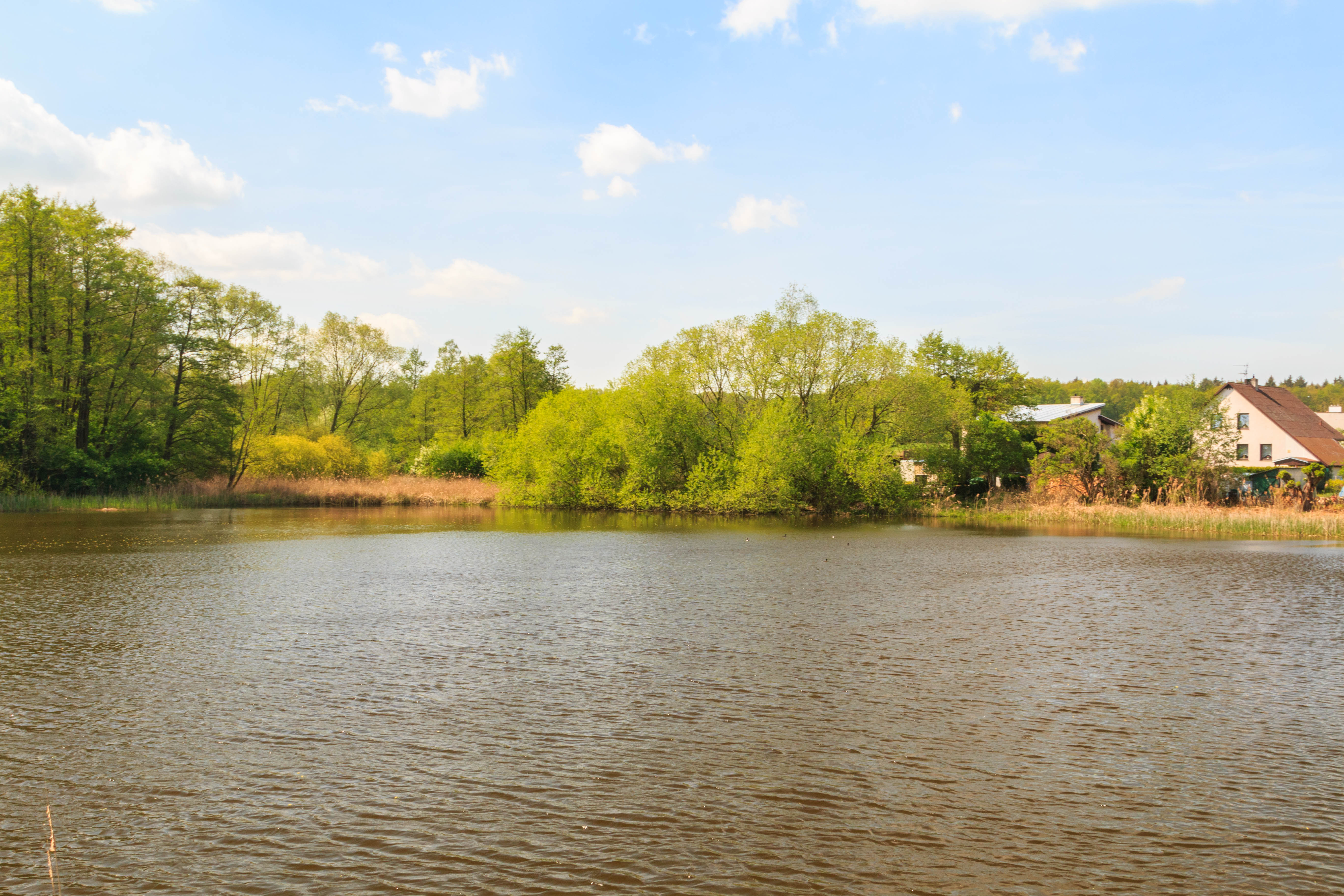 Svojšický rybník Project: Vodstvo.